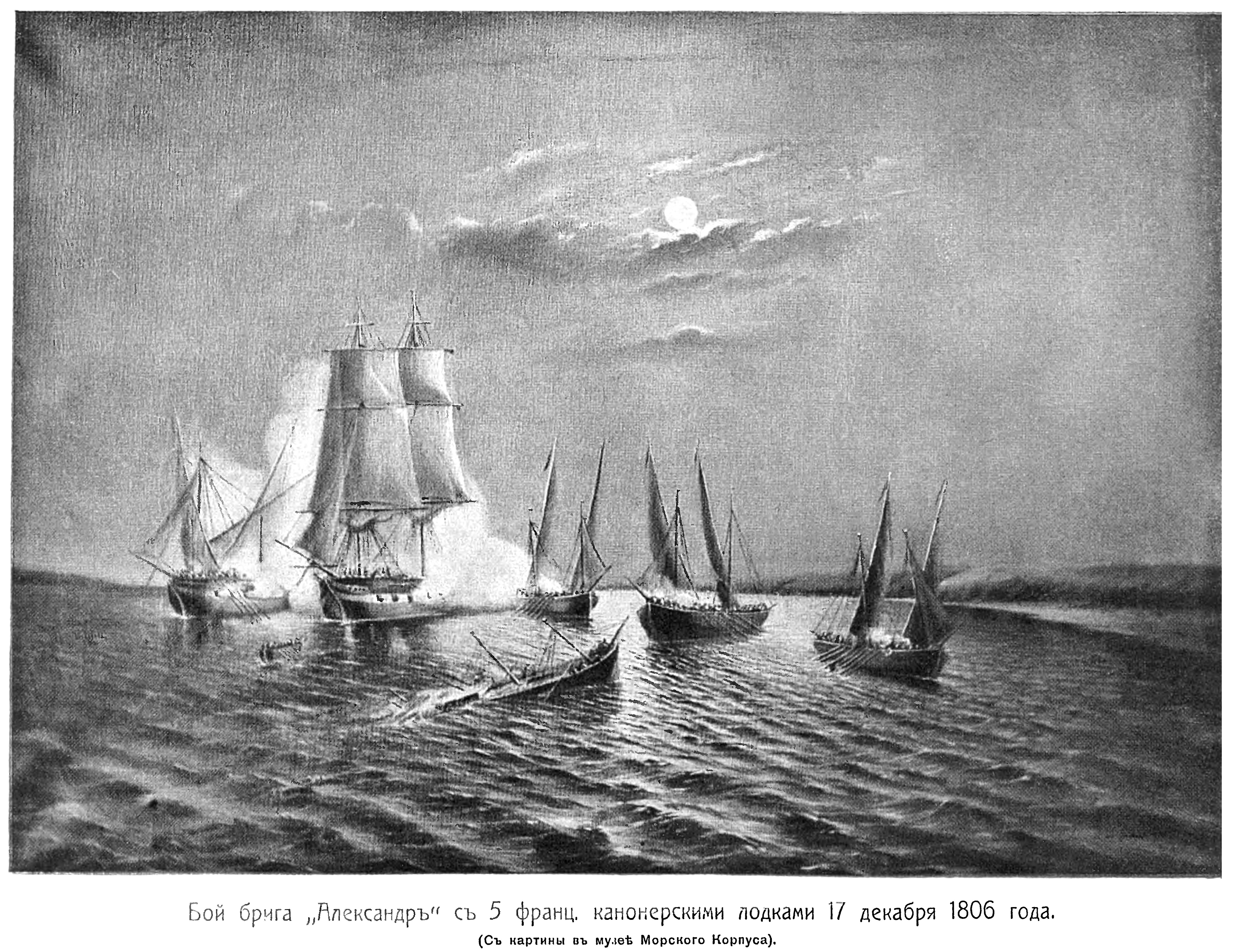 Изображение из «Военной энциклопедии» изданной книгоиздательским товариществом Ивана Дмитриевича Сытина. Санкт-Петербург; 1911—1915 гг. Фото к статье «Александр». Бой брига «Александр» с пятью французскими кораблями у острова Браццо (17 декабря 1806 года)